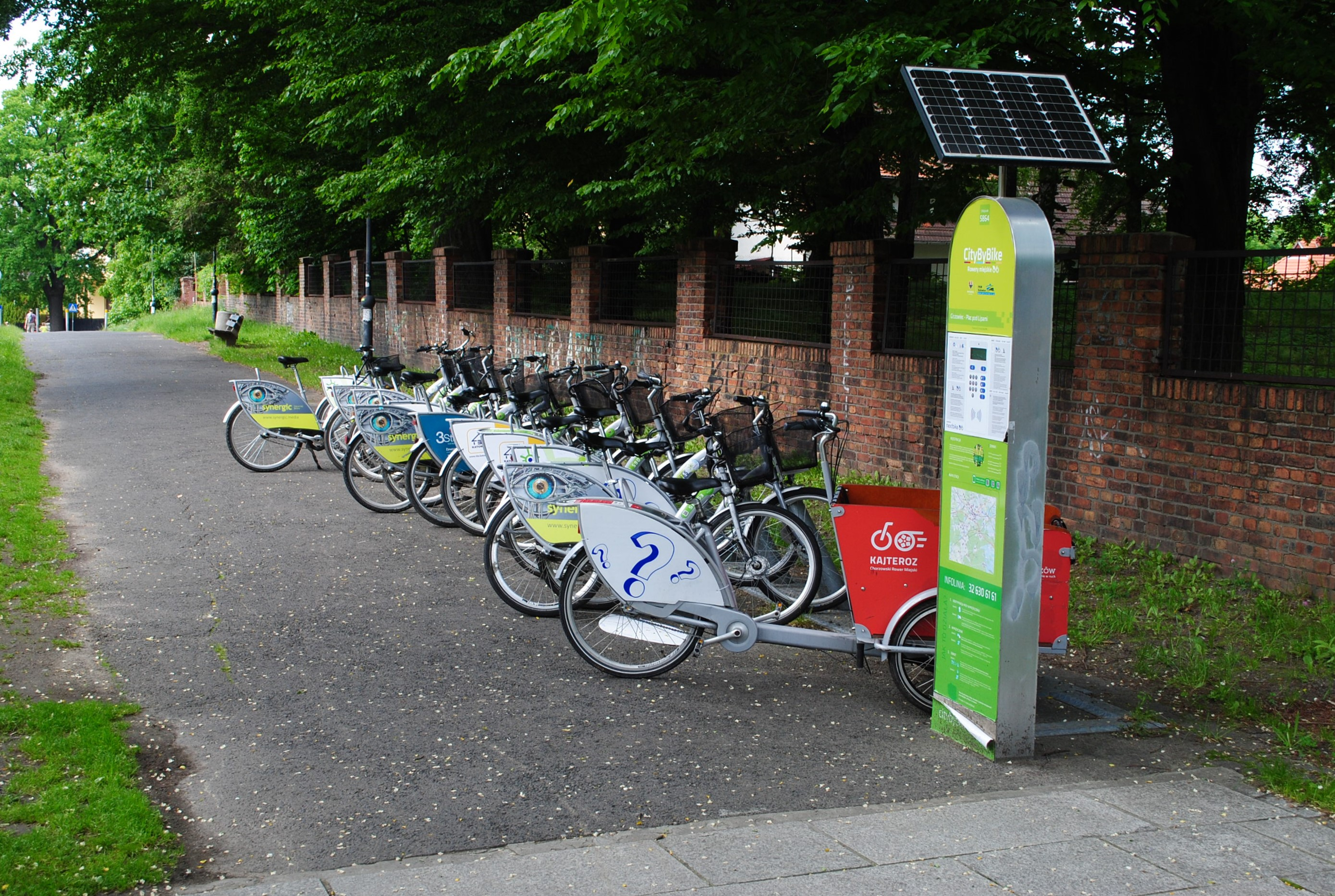 Katowice - Giszowiec. Ulica Batalionów Chłopskich